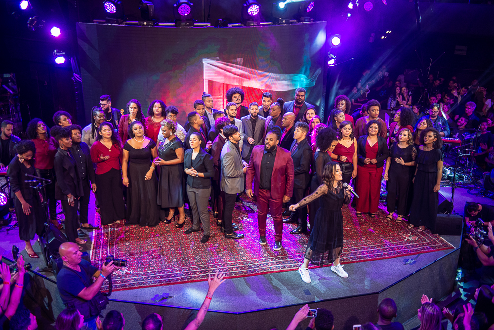 Gravação do Álbum Outra Vez, Diante do Trono 19, Ana Paula Valadão